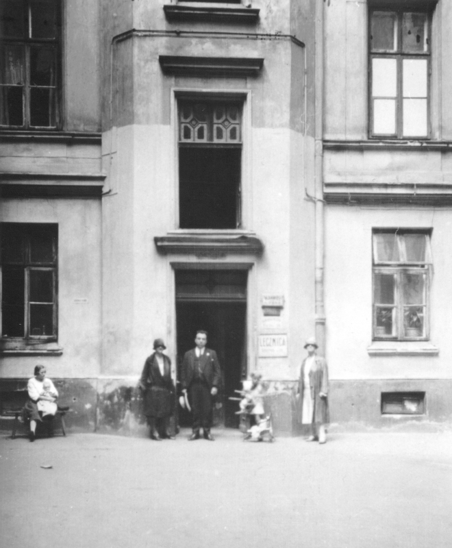 Innenhof des Hauses Dzika 9, Warschau um 1920. Klara Zamenhof, Edmond Privat und Julia Isbrücker im ehemaligen Wohnhaus Ludwik L. Zamenhofs